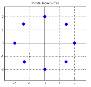 Const 8PSK